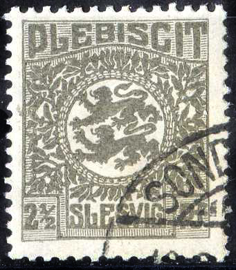 Плебисцитная почтовая марка Шлезвига, 1920 год